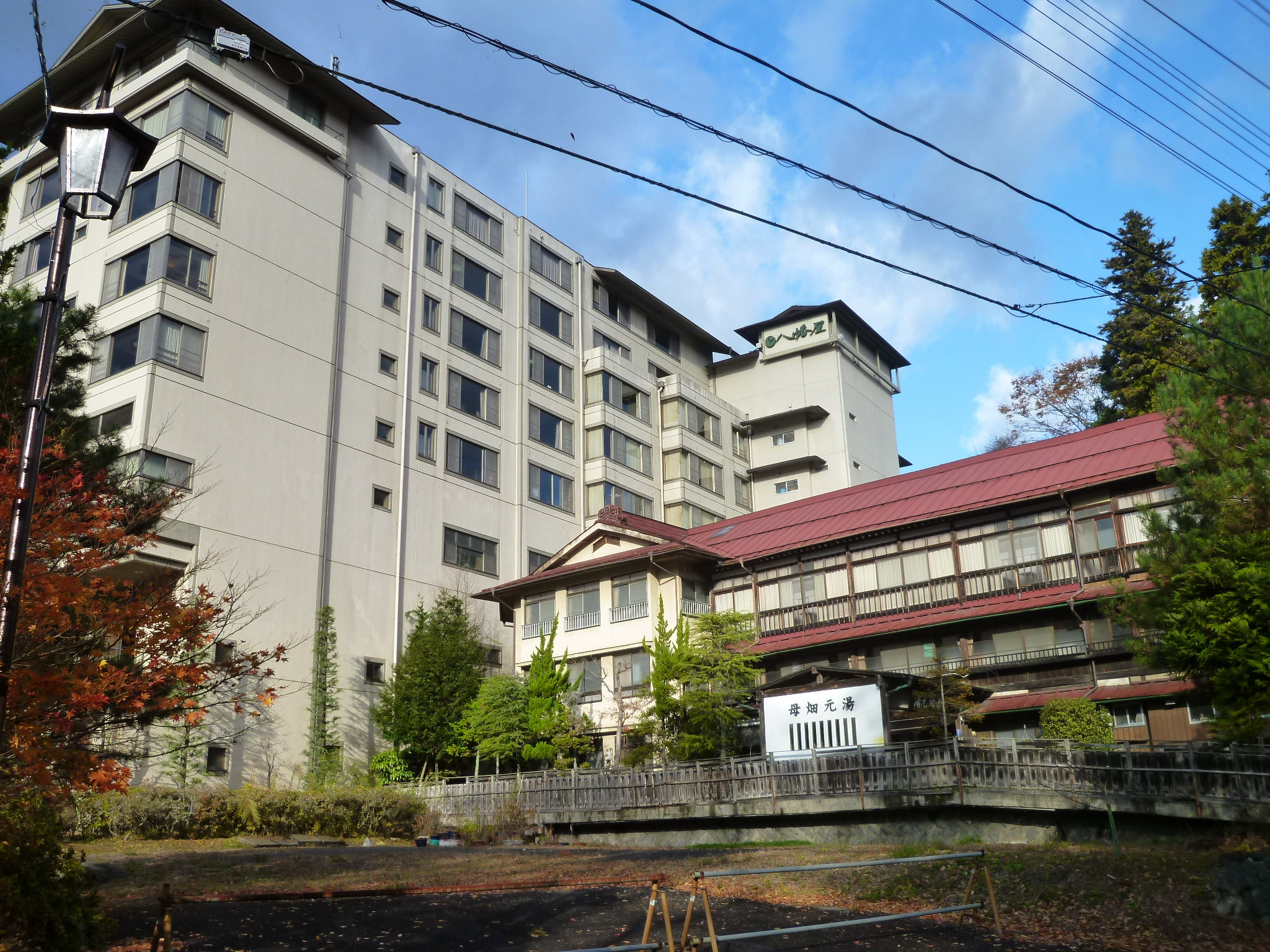 福島県の母畑温泉。右手前が「母畑元湯」。左奥が「八幡屋」。